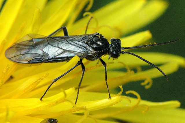 Dolerus aeneus from Commanster, Belgian High Ardennes .